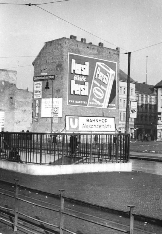 Illus-Funck Kno-Be. 12.2.51 Persil ist wieder da. Auf dem Alexanderplatz in Berlin wurde an einer Hauswand eine Reklamefläche angebracht, die auf das von der VVB Sapotex in alter Qualität herausgebrachte Waschmittel "Persil" hinweist.